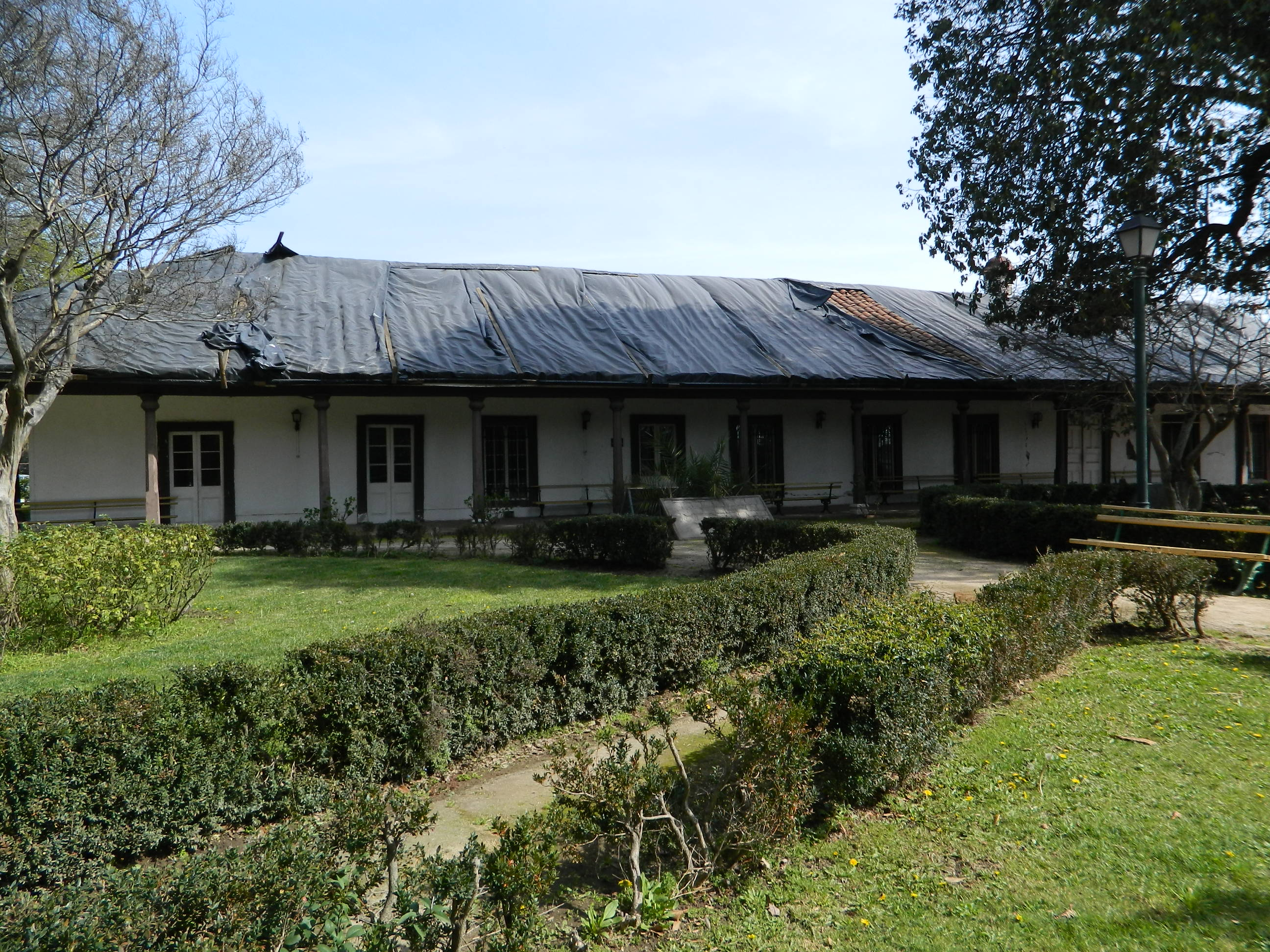 El ex Fundo el puente era parte del Fundo El Carmen, perteneciente a Gabriel Soto y Córdova. En 1814 se instaló el cuartel General del Coronel Español Mariano Osorio, durante la Batalla de Rancagua. Destaca su aspecto colonial, con muros de adobe y pilares de roble. Desde 1971 estos terrenos son pertenecientes de la Municipalidad de Rancagua, quien la destinó como Casa de la Cultura y Biblioteca Municipal. This is a photo of a national monument in Chile: 363